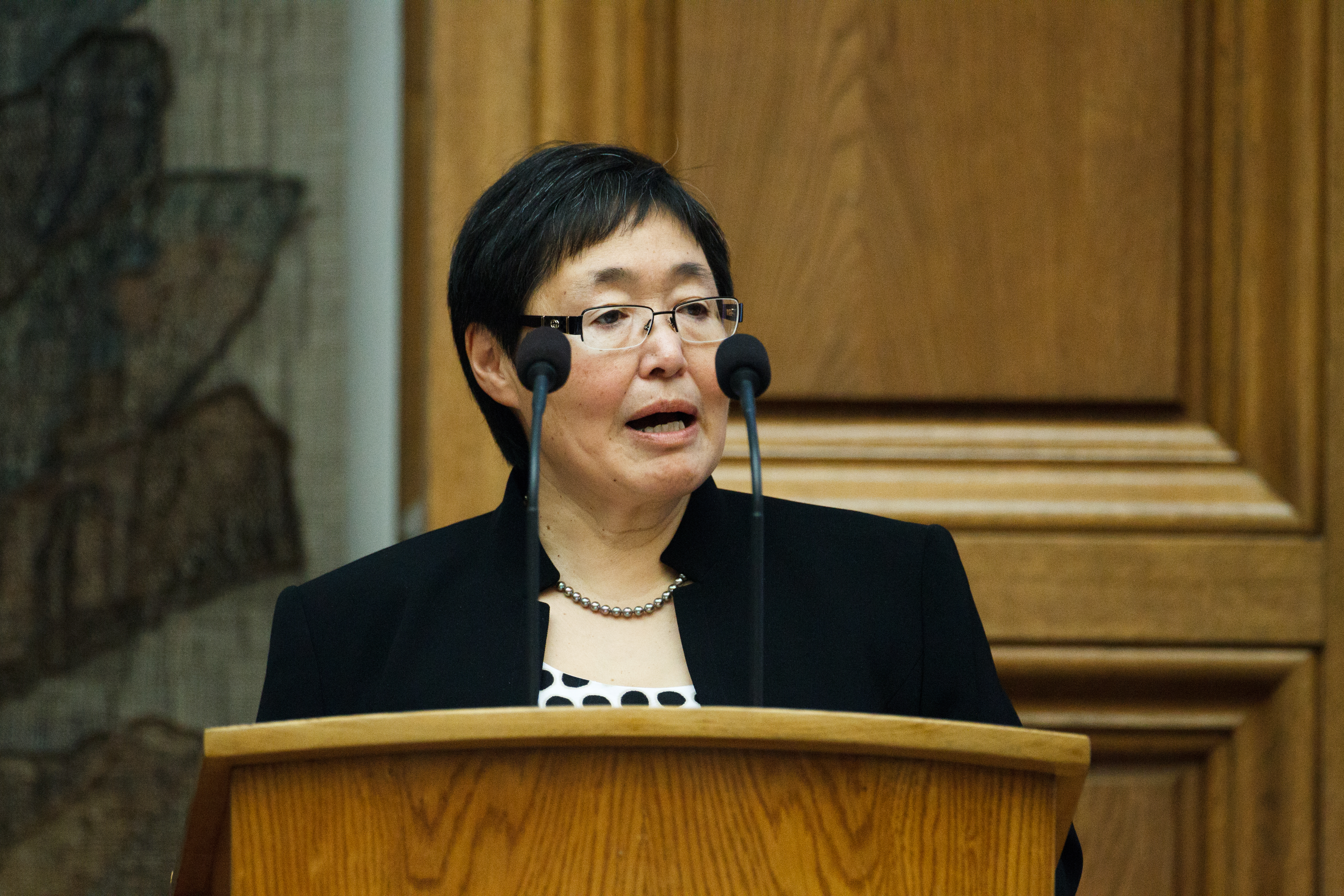 Mimi Karlsen vid Nordiska Rådets session 2011 i Köpenhamn.